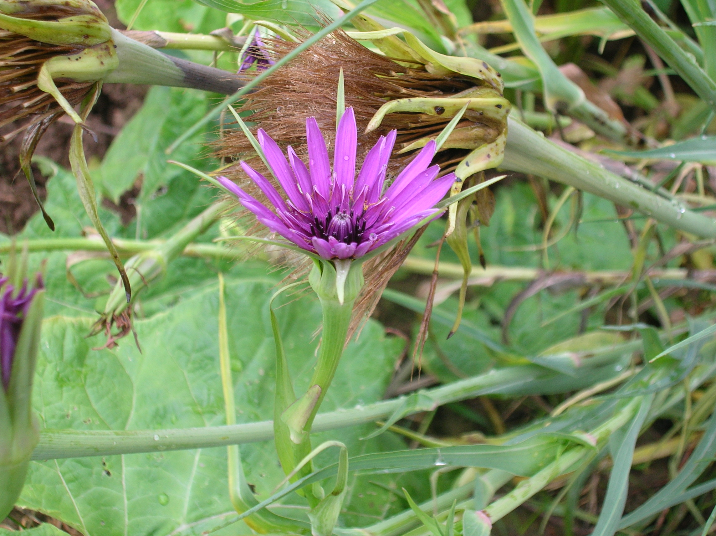 purpura tragopogona floro